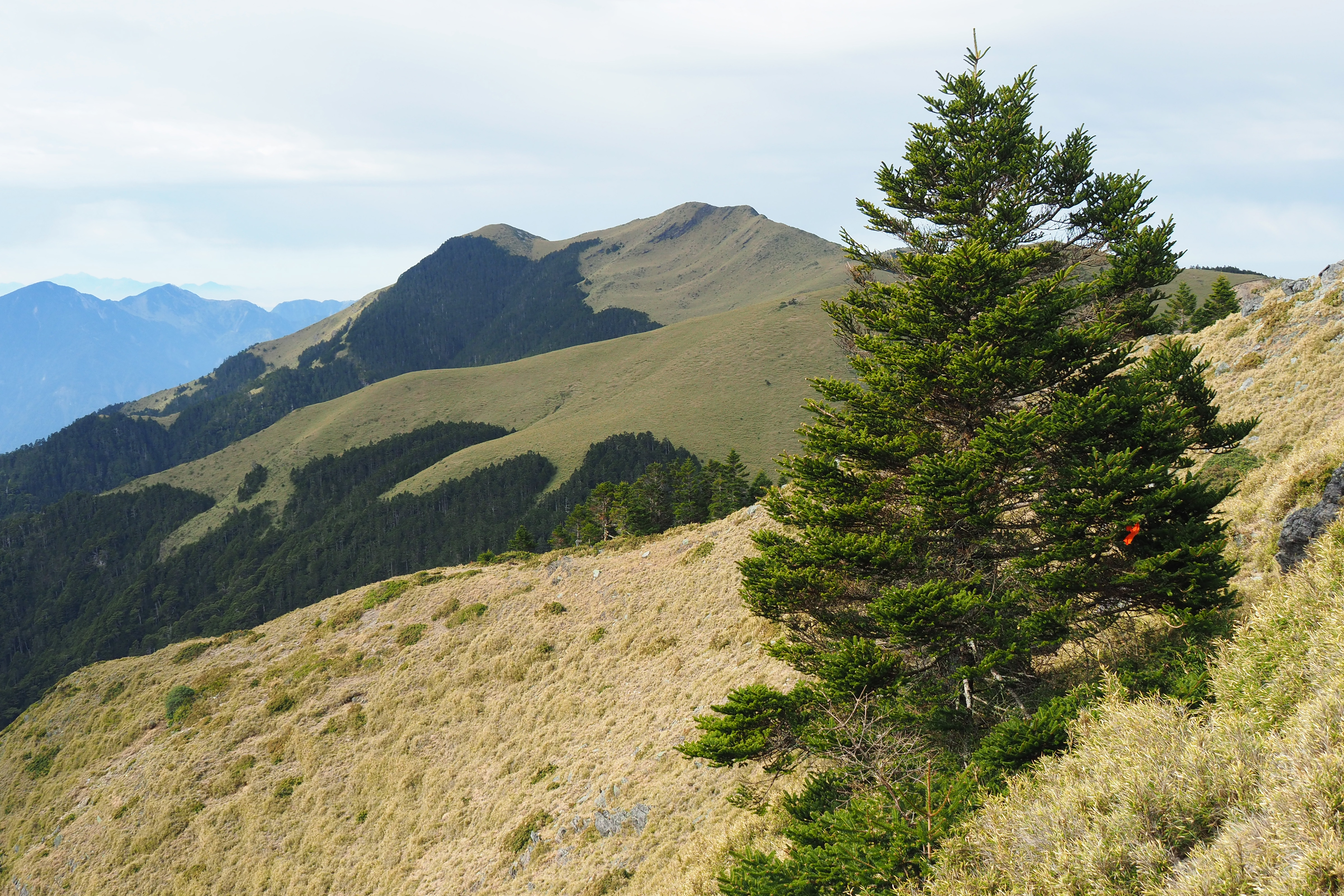 中文（台灣）: Mt.DaXue 大雪山主峰